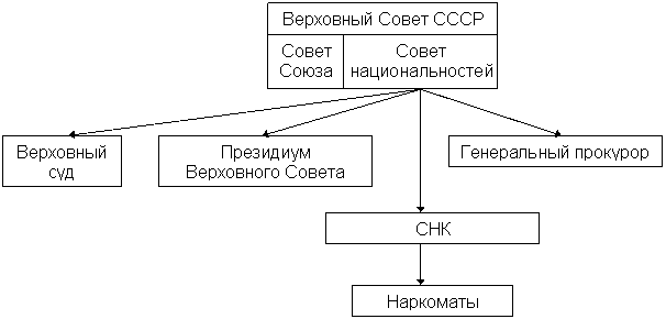 Высшие органы государственной власти по Конституции СССР 1936 года